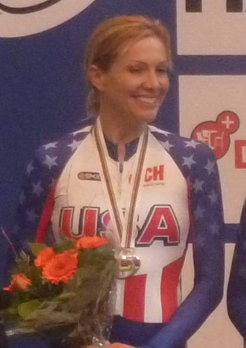 US-amerikanisches Team in der Mannschaftsverfolgung bei der Bahn-WM 2011, v.l.n.r.: Dotsie Bausch, Sarah Hammer, Jennie Reed